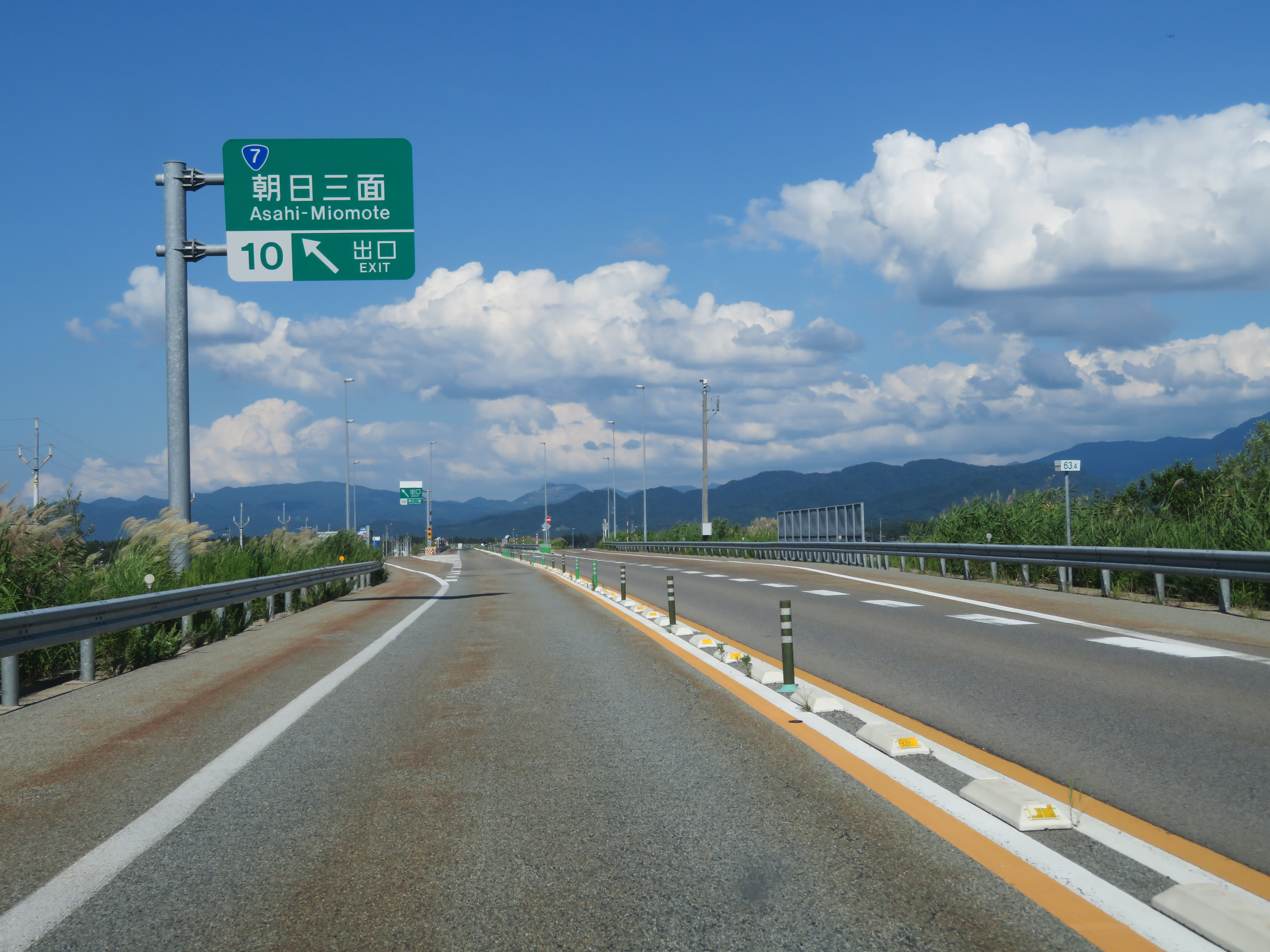 日本海東北自動車道 朝日三面インターチェンジ出口付近（新潟方面側から撮影）